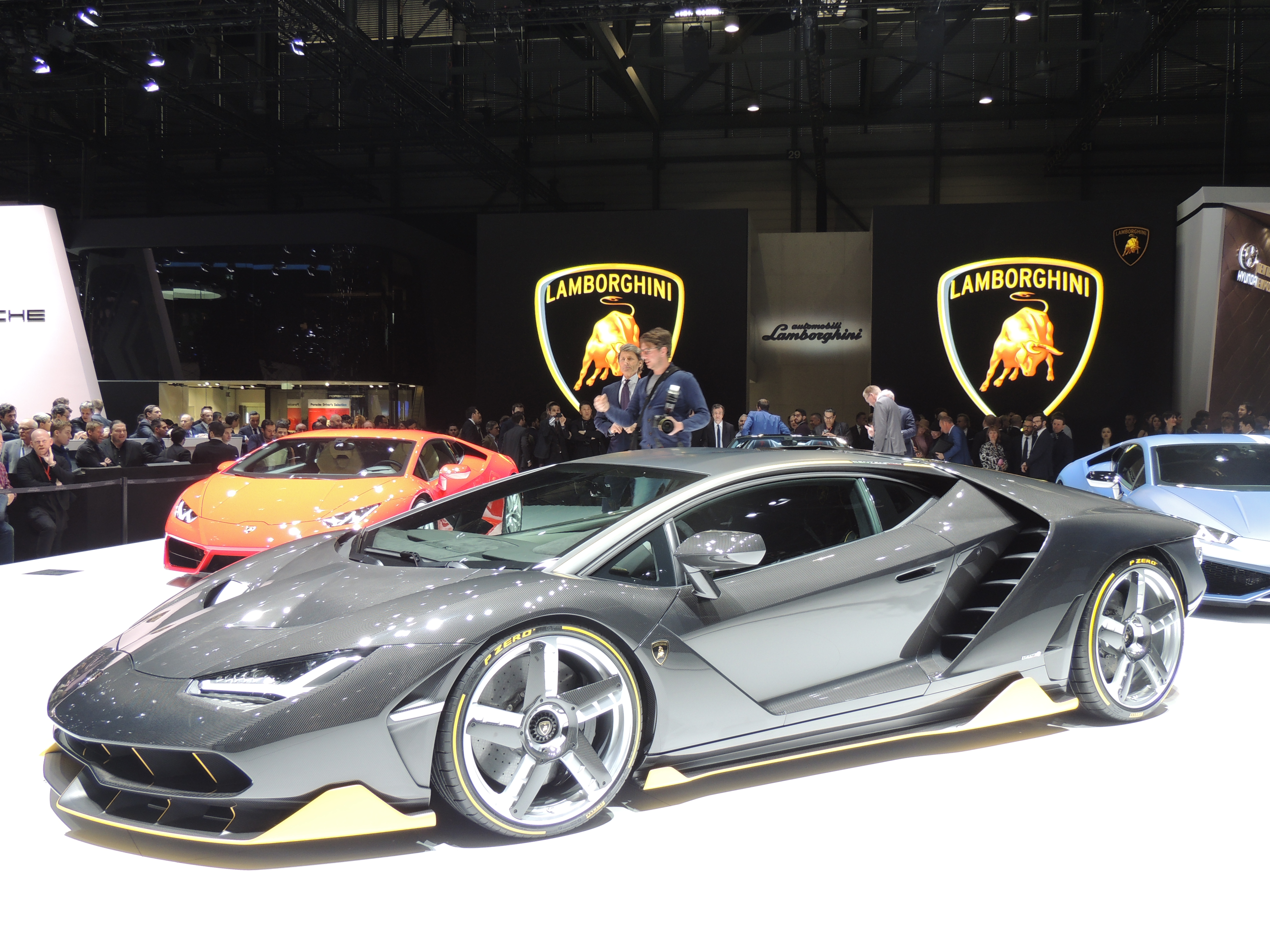 Lamborghini Centenario, salon de Genève 2016